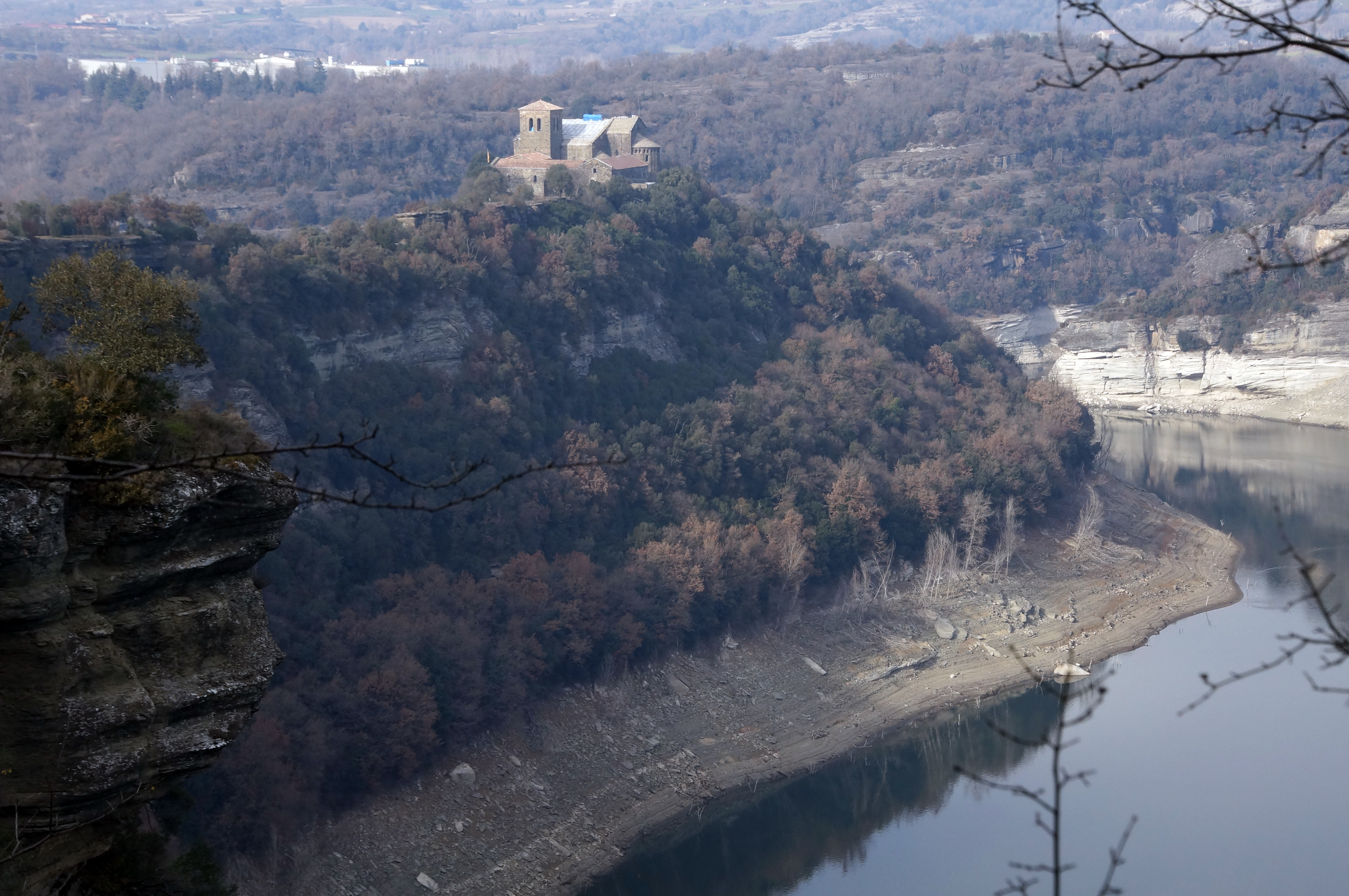 Monestir de Sant Pere de Casserres (les Masies de Roda)